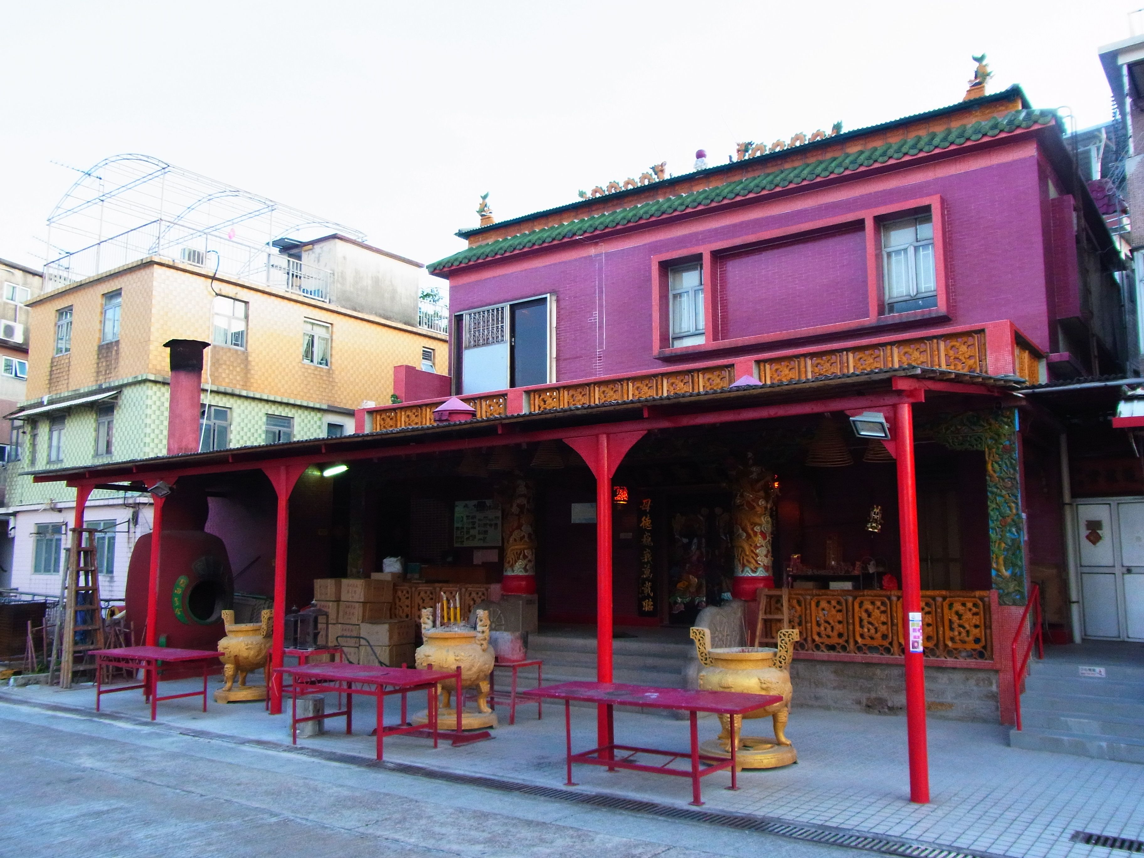 中文（香港）: 坪洲的龍母廟